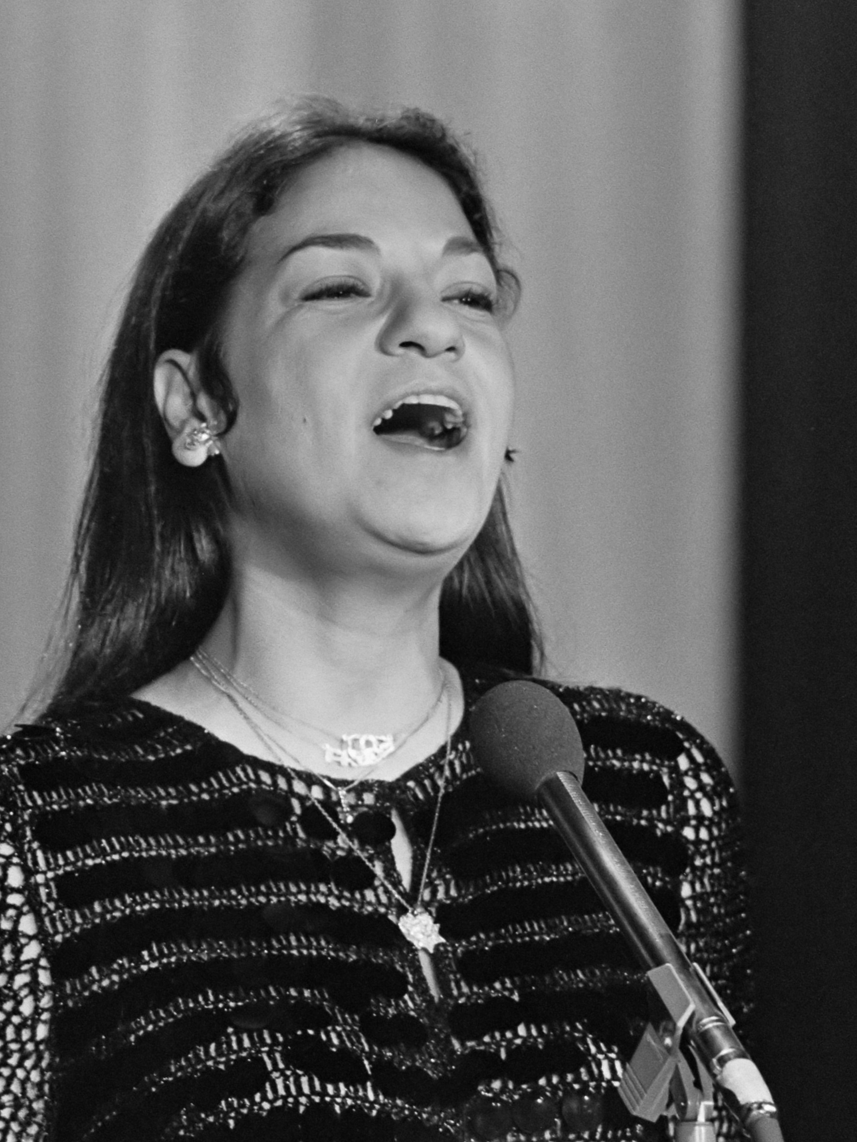 "n rondje theater" van KRO-TV; Frida Boccara in aktie tijdens opnamen 12 november 1975